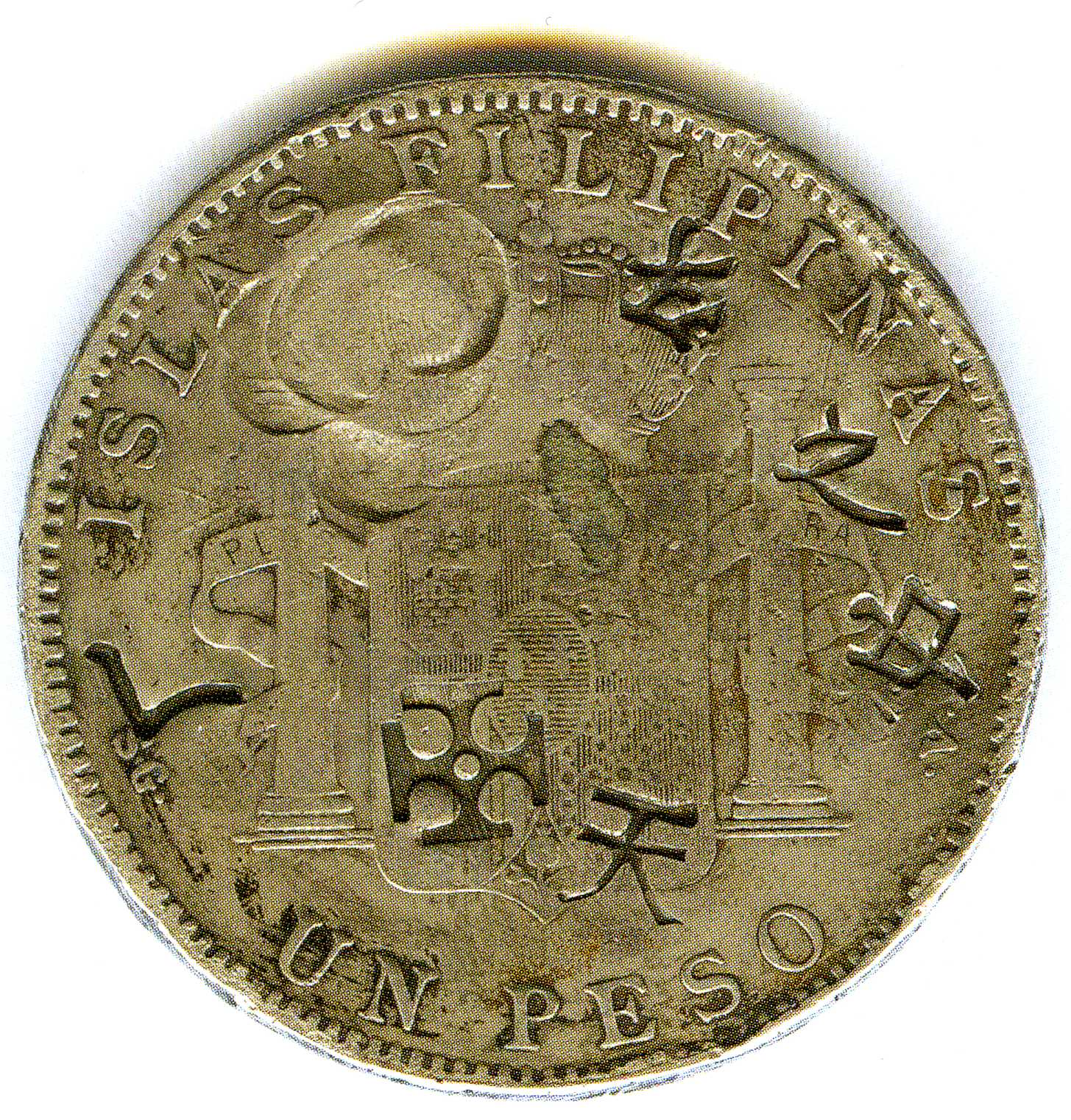 Moneda española con singos chinos para circular en Timor.